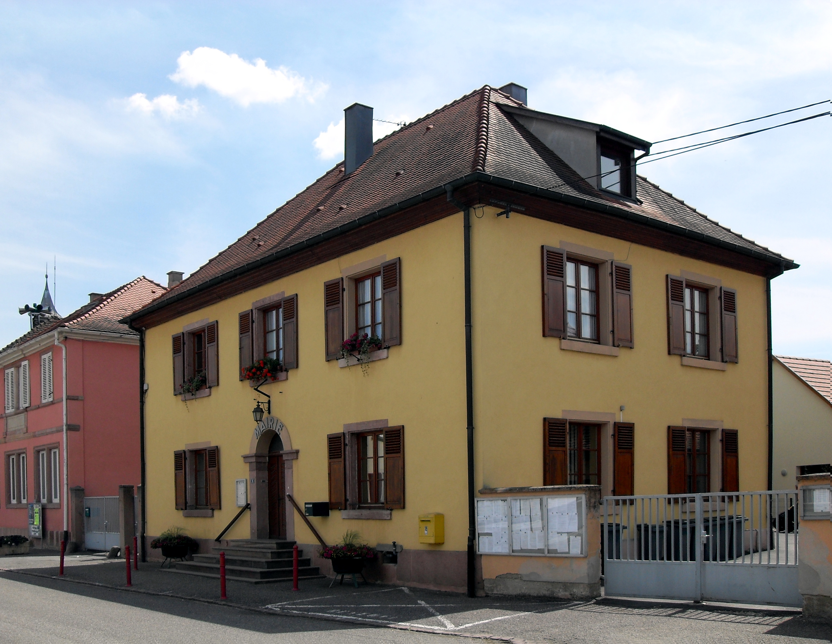 La mairie Widensolen